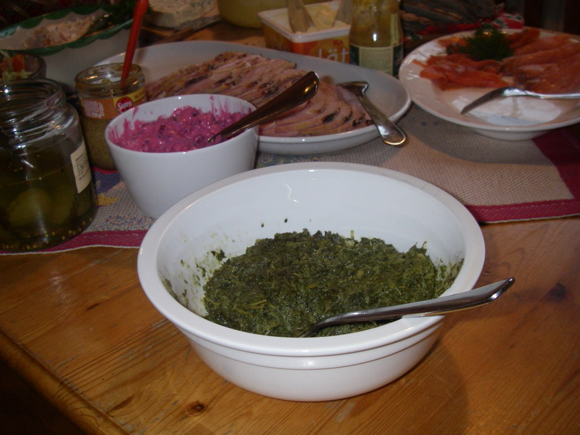 Långkål